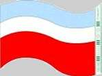 Bandera del Municipio de Toribío